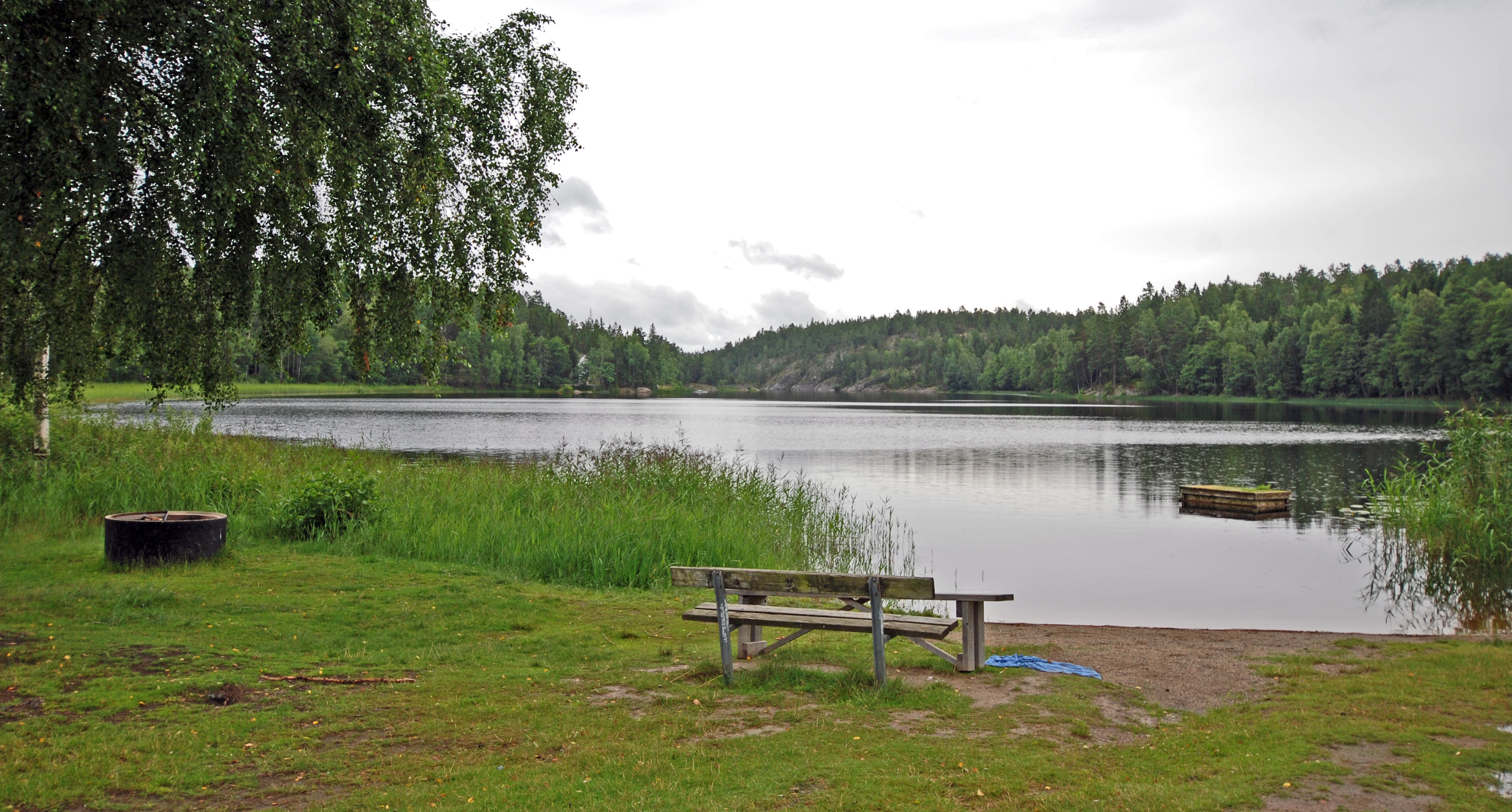 Lycksjön, Haninge kommun